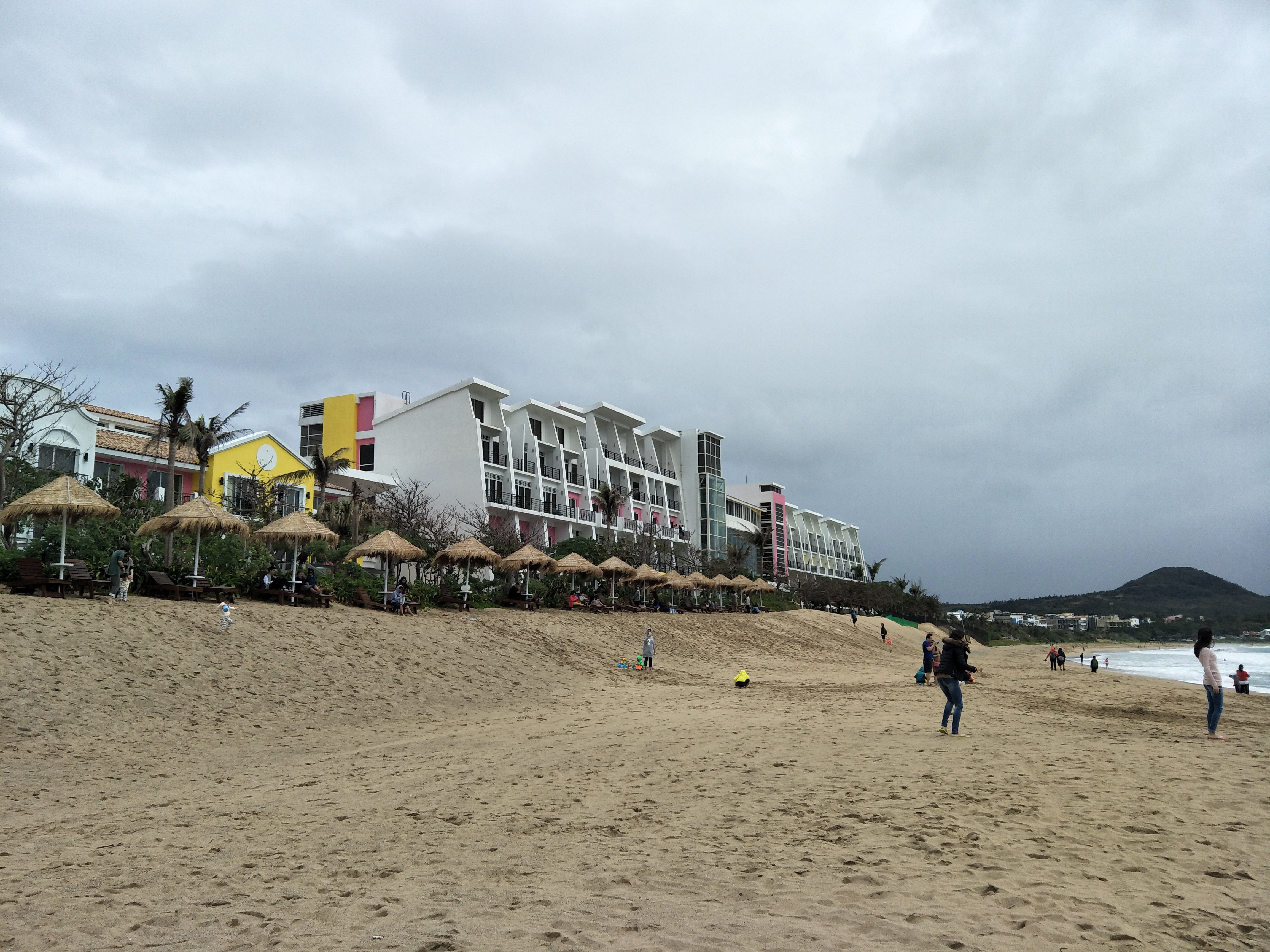 從沙灘看過去的墾丁夏都沙灘酒店。